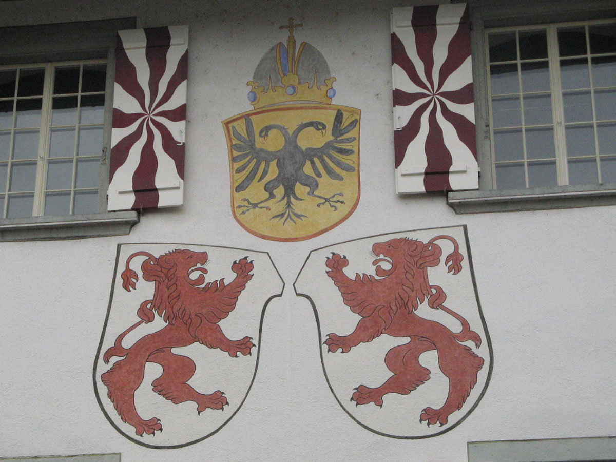 Wappen von Bremgarten mit Reichsadler, Wandmalerei am alten Zeughaus